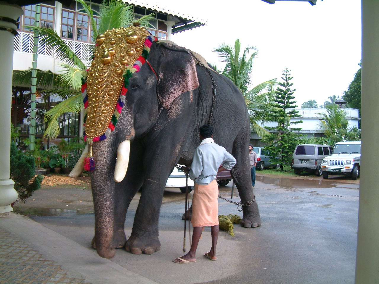 ചള്ളിയാൻ എടുത്തത്